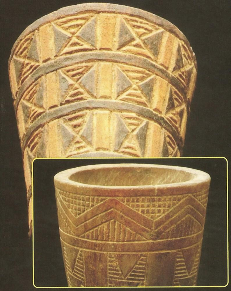 Llullaillaco 2 Keros. Tomada en vitrina 6